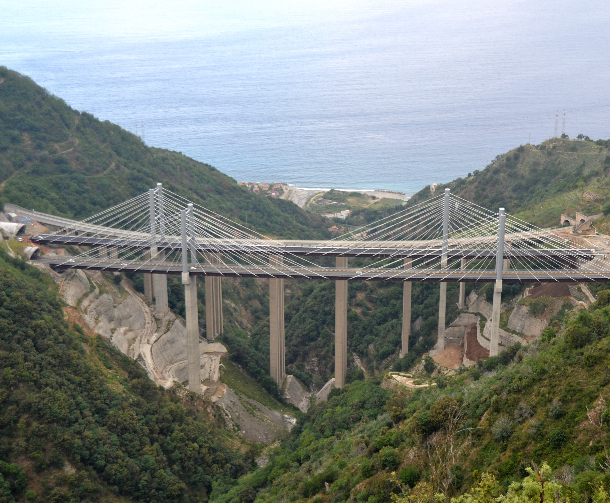 Viadotto Favazzina sull'autostrada A3 in provincia di Reggio Calabria